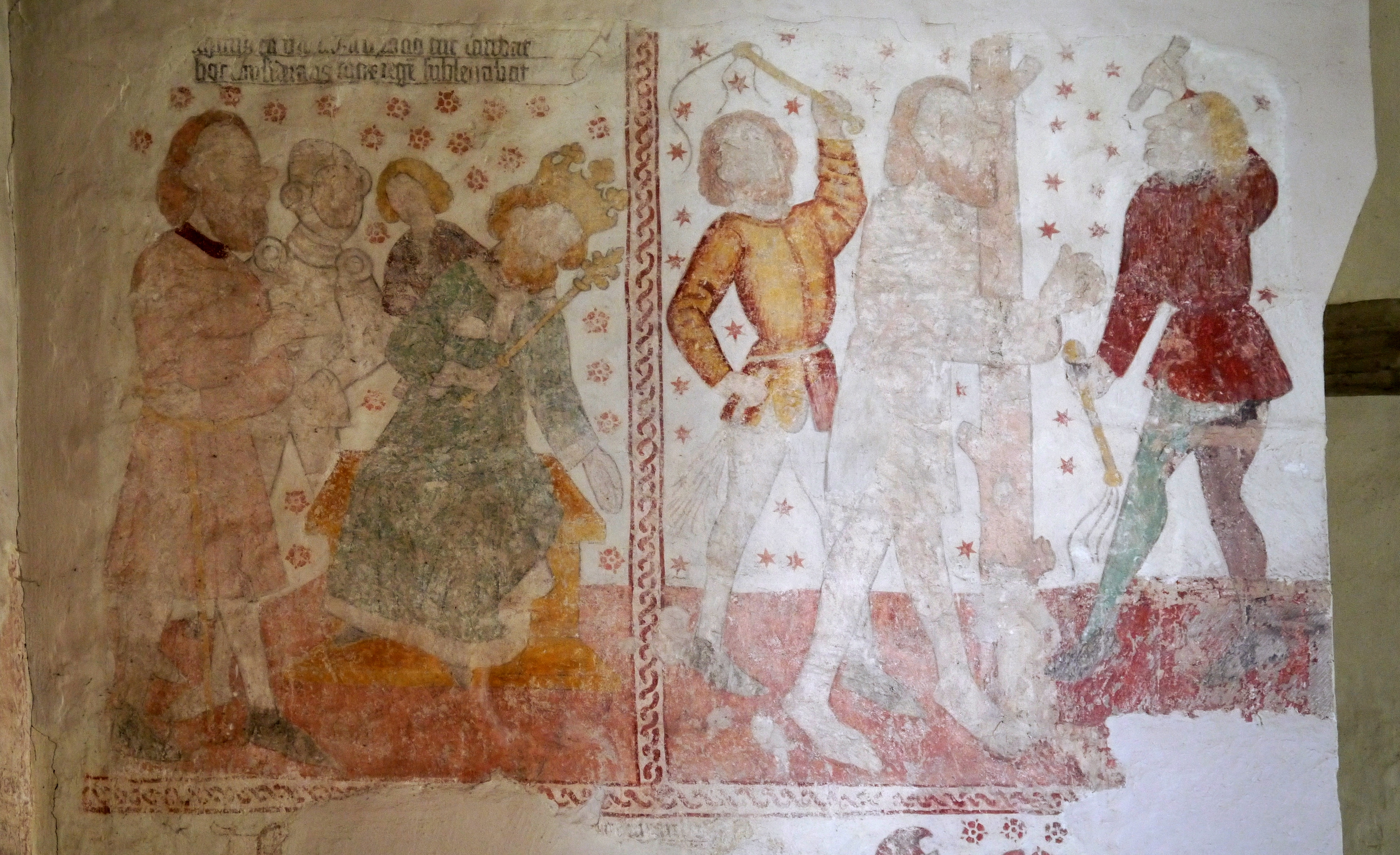 Gotische Fresken aus der Zeit um 1400 mit Darstellungen aus der Christophorus-Legende über dem Eingang an der Westwand der Kirche St. Christophorus, Reinhausen, Südniedersachsen.